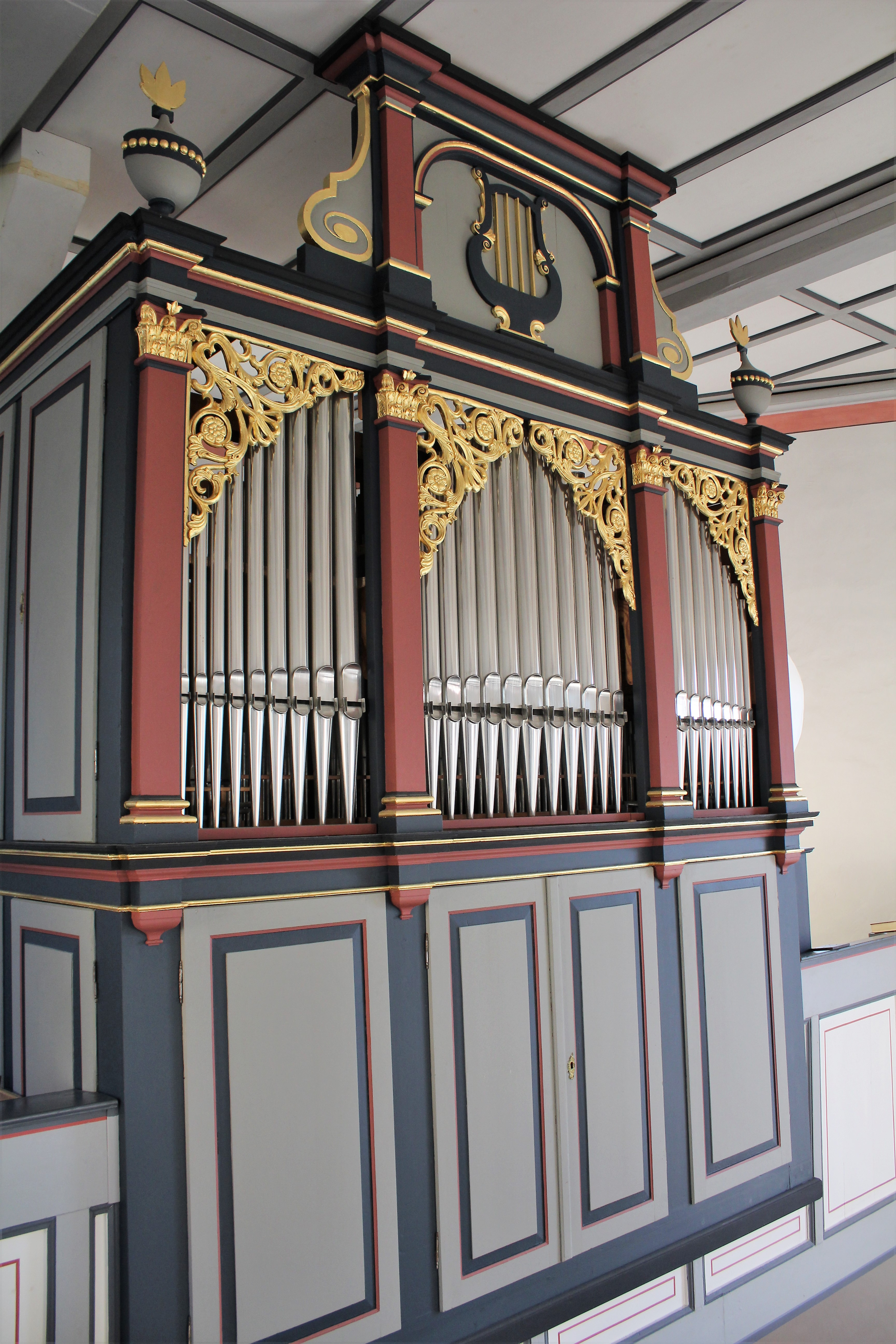 Evangelische Kirche Eichen (Nidderau), Main-Kinzig-Kreis, Hessen, Deutschland